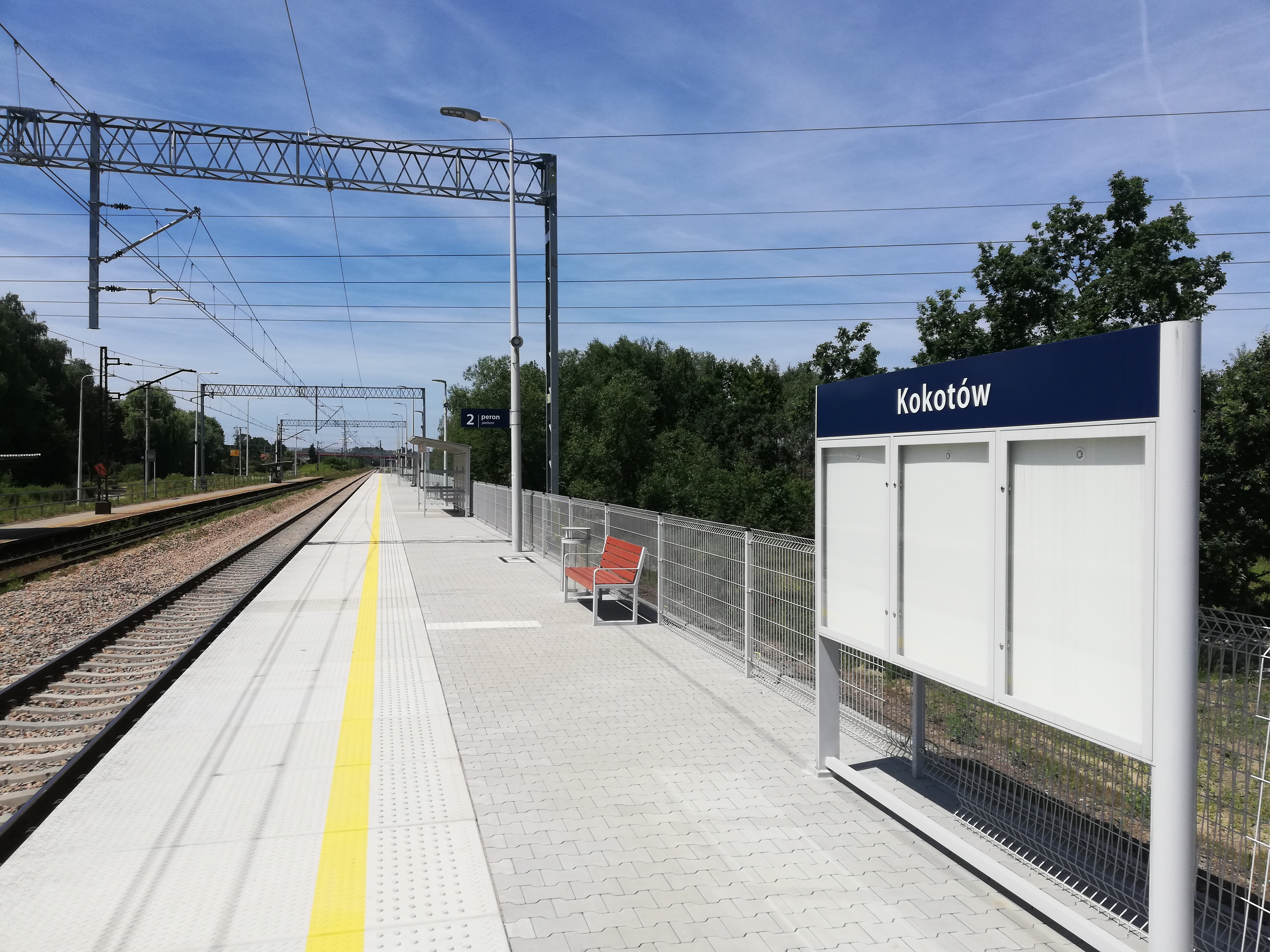 Peron przystanku kolejowego Kokotów w trakcie modernizacji w 2019 roku